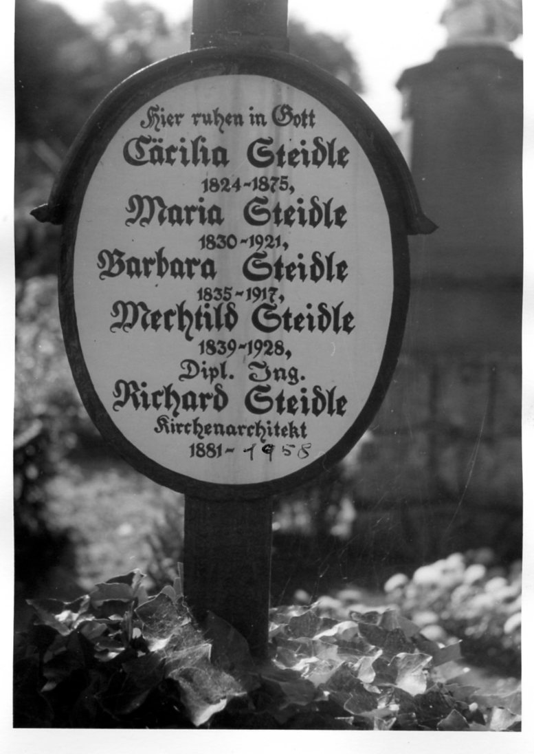 Grab Richard Steidle (Archtekt)